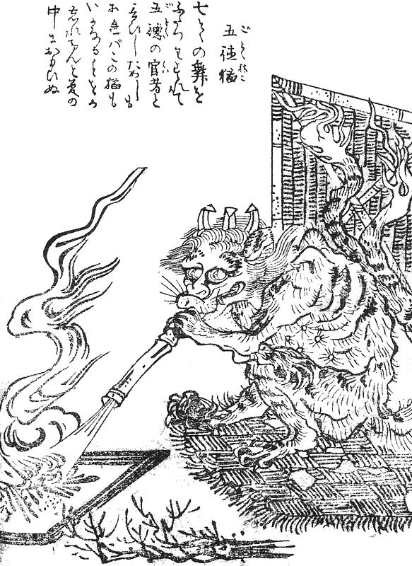 Gotoku-neko (五徳猫) from the Gazu Hyakki Tsurezure Bukuro (百器徒然袋)